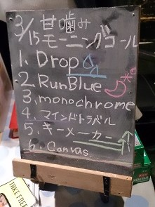 amiinaセトリボード(20150315(1))